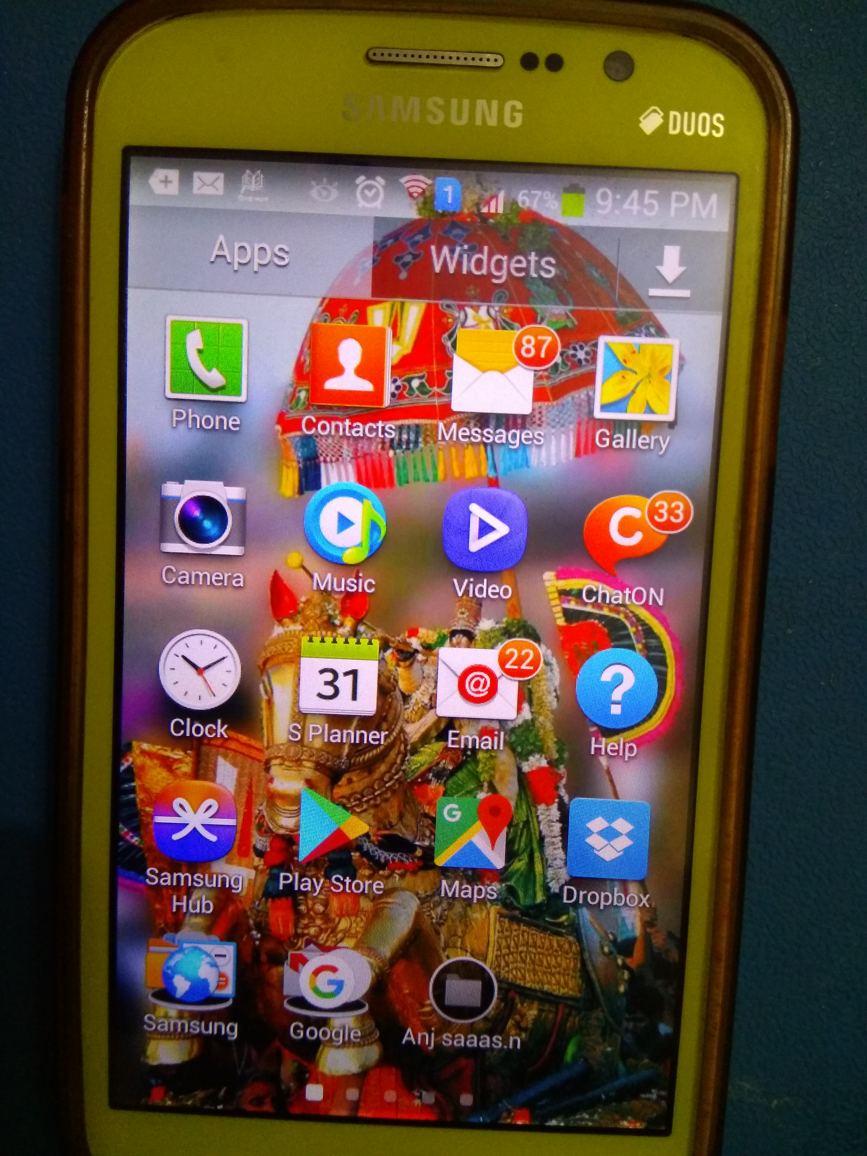 Example for tele communication